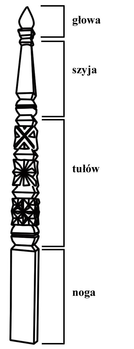 Budowa słupowego nagrobka szeklerskiego